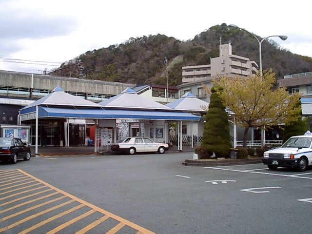 伊豆急行河津駅